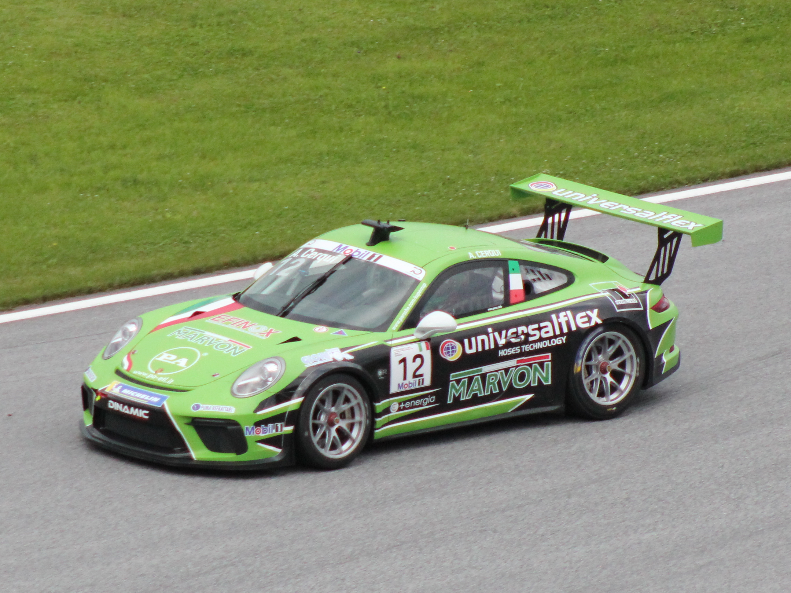 12 Alberto Cerqui beim Rennwochenende in Österreich 2018